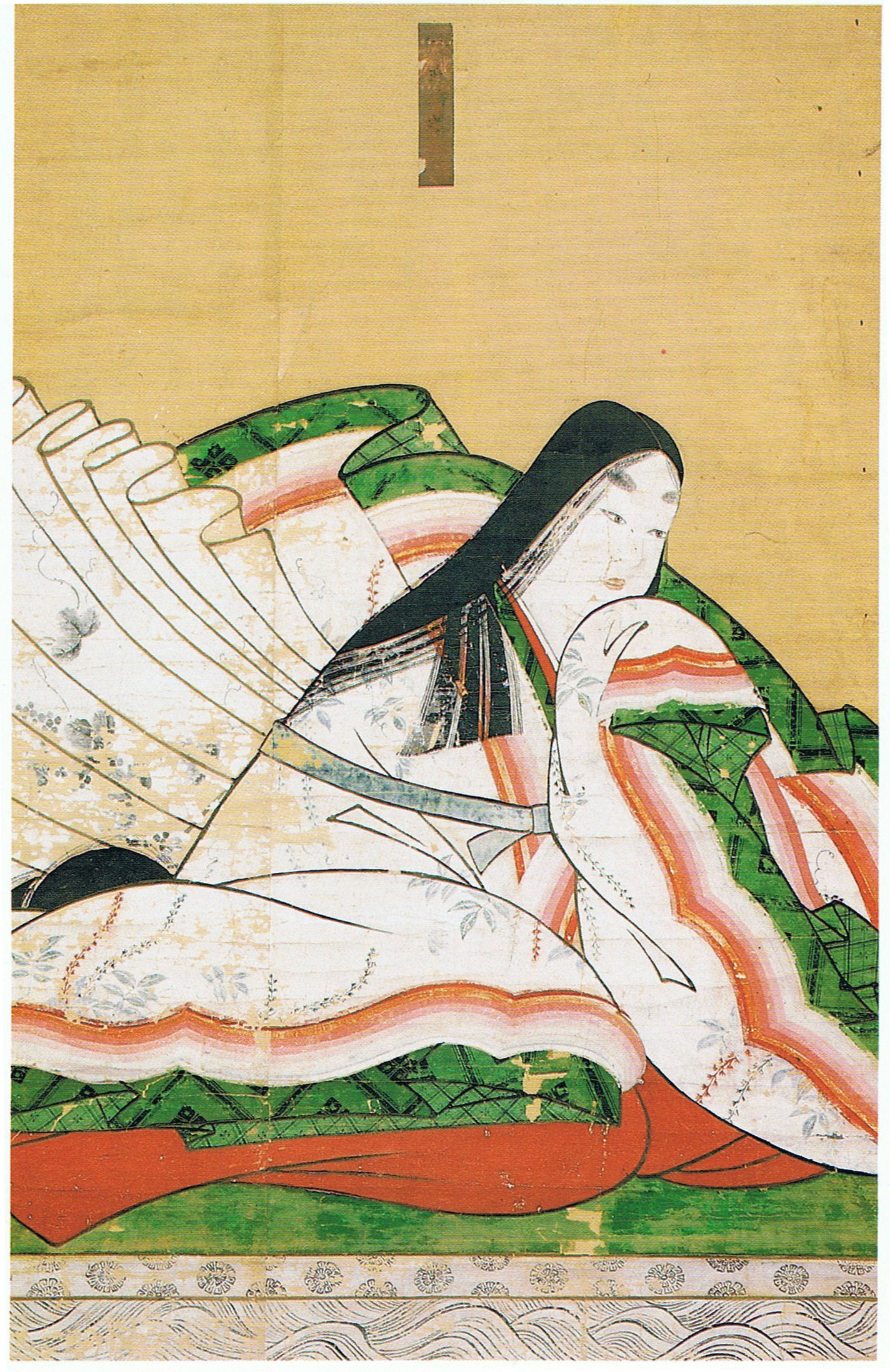 藤原領子（平時忠妻）